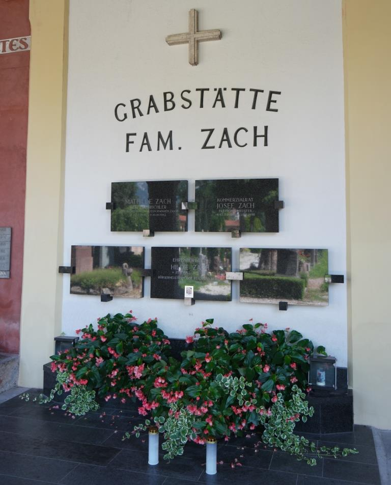 Grab der österreichischen Kommunalpolitikerin Hilde Zach (1942-2011) auf dem Westfriedhof Innsbruck